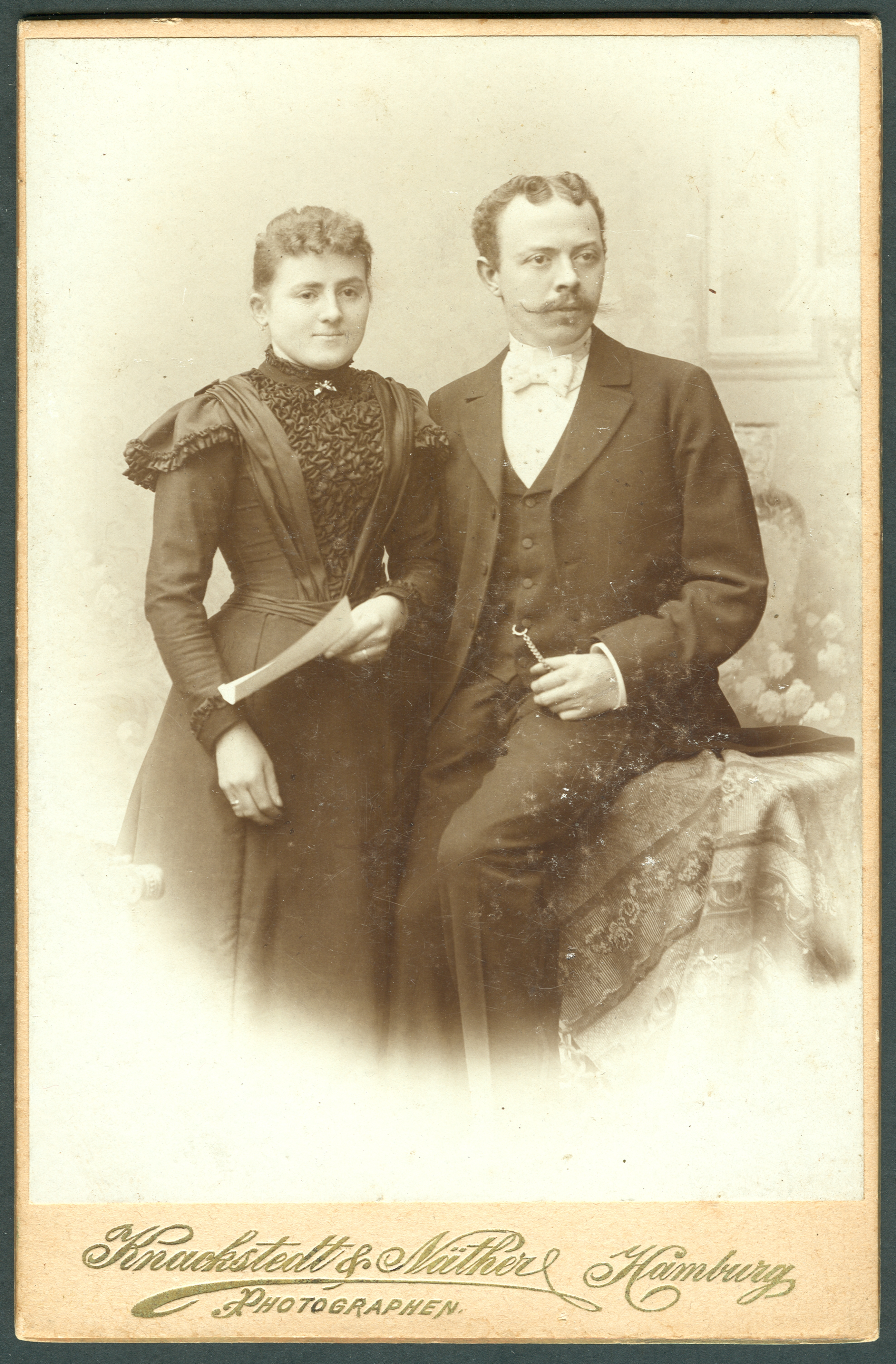 Kabinettfotografie von Knackstedt & Näther eines Paares. Mann und Frau haben einen - aus heutiger Sicht ausgefallenen - ähnlichen Kurzhaarschnitt mit Locken um den Mittelscheitel.